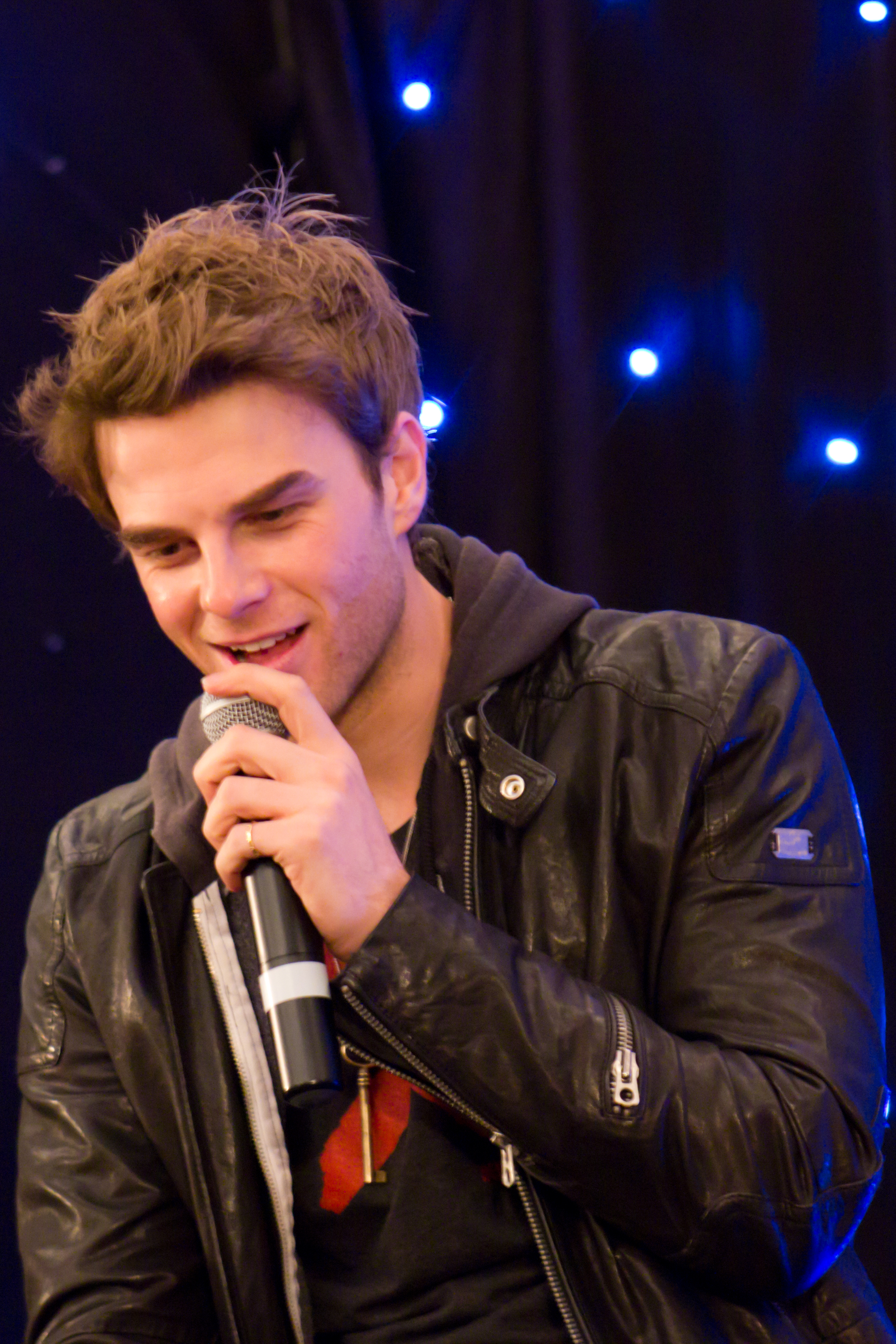 Nate Buzolic